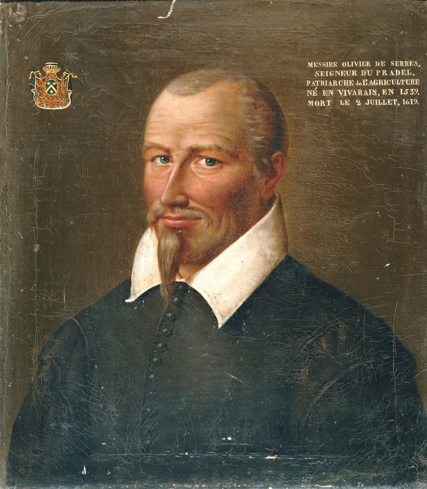 Anonyme